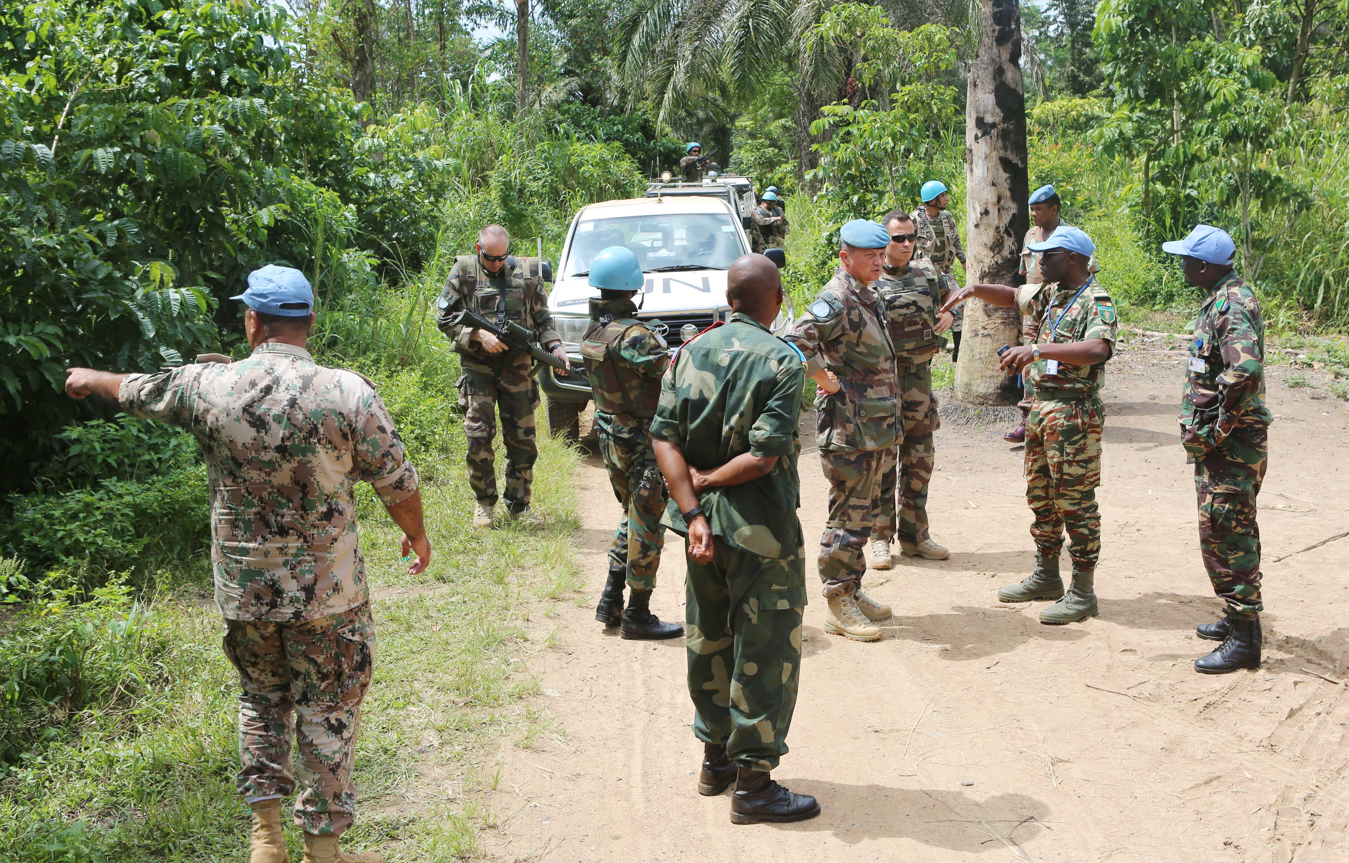 19 mai 2015, Territoire de Beni, Province du Nord-Kivu, RD Congo: Le Commandant adjoint de la Force de la MONUSCO, le major-général Jean Baillaud, effectue une visite sur les sites de massacres à Oicha et Mbau, lors d’une mission dans la région de Beni. Photo MONUSCO/Myriam Asmani = 19 May 2015, Beni territory, North Kivu province, DR Congo : The MONUSCO Force Deputy Commander, Major General Jean Baillaud, visits sites of massacres at Oicha and Mbau, during a mission to the region of Beni. Photo MONUSCO/Myriam Asmani